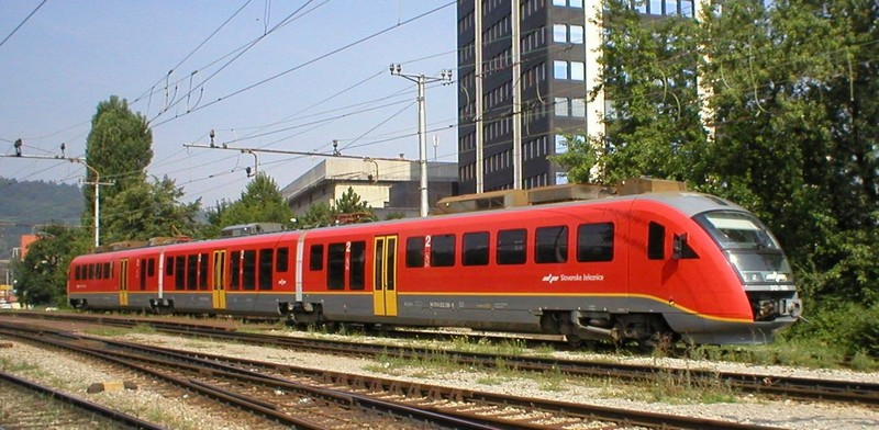 SŽ series 312 EMU in Ljubljana, Slovenia